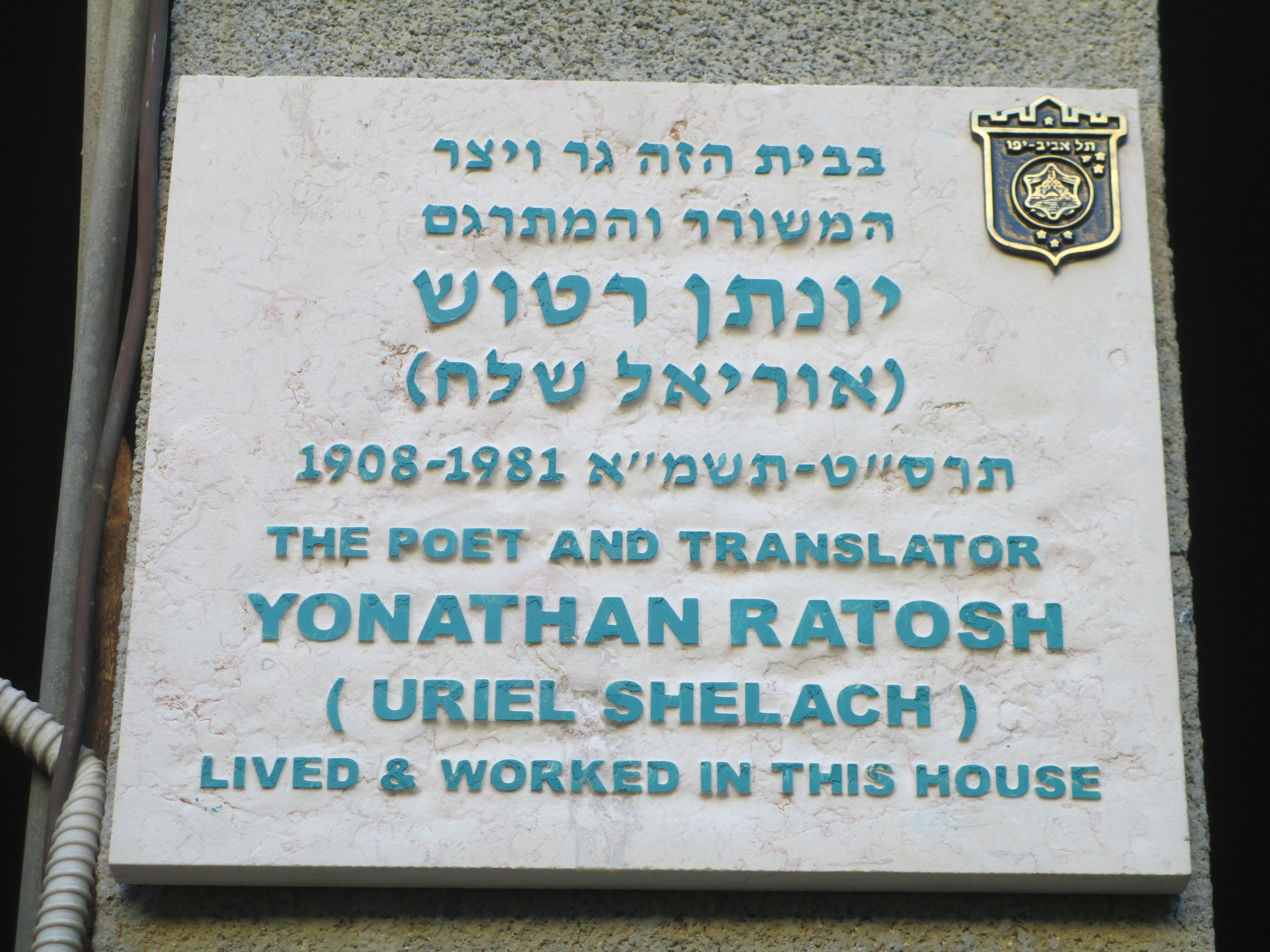 לוחית זיכרון למשורר יונתן רטוש ברחוב אלכסנדר ינאי 2 בתל אביב